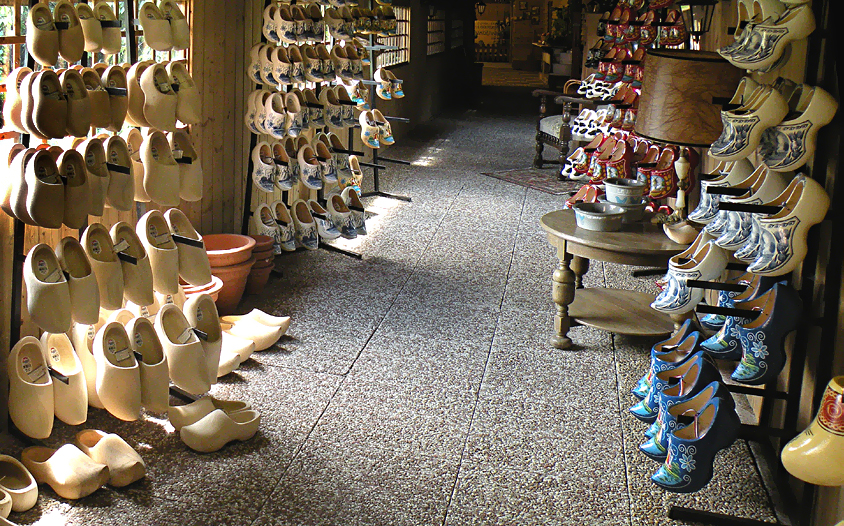 Clogs (Ven kolonie.Holland)